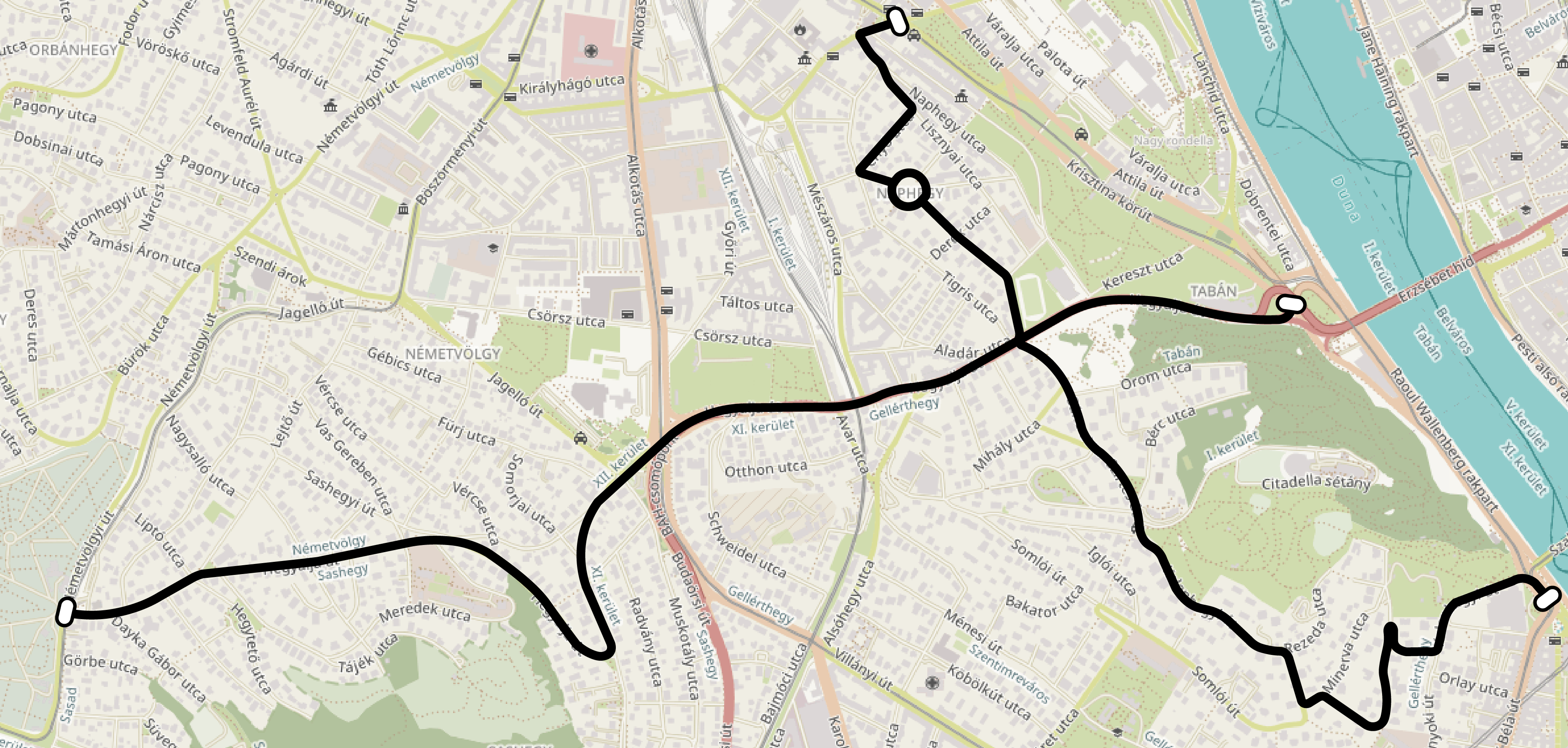 Az 1946-ban megtervezett trolibuszhálózat gellérthegyi része. This map may be incomplete, and may contain errors. Don't rely solely on it for navigation.